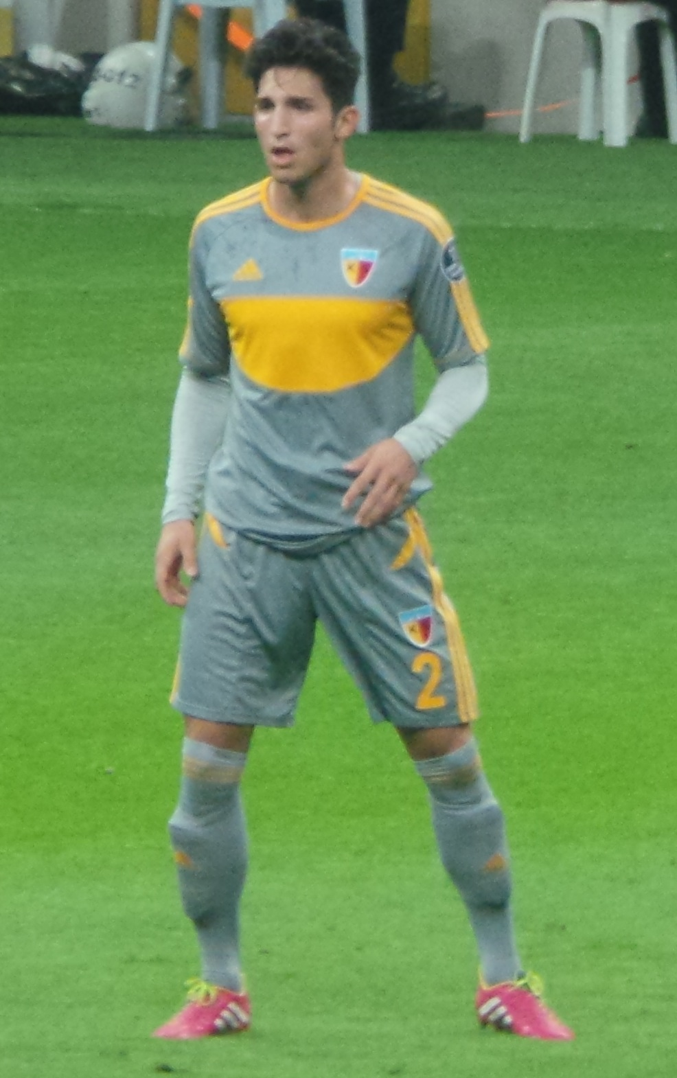 Levent Gülen